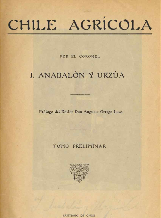 Portada de libro "Chile Agricola" de Anabalón y Urzúa, I. Orrego Luco, Augusto